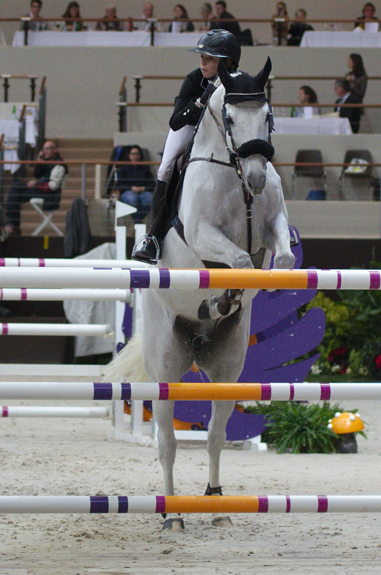 54eme CHI de Genève - 20141213 - Coupe de Genève - Anna-Julia Kontio et Fardon